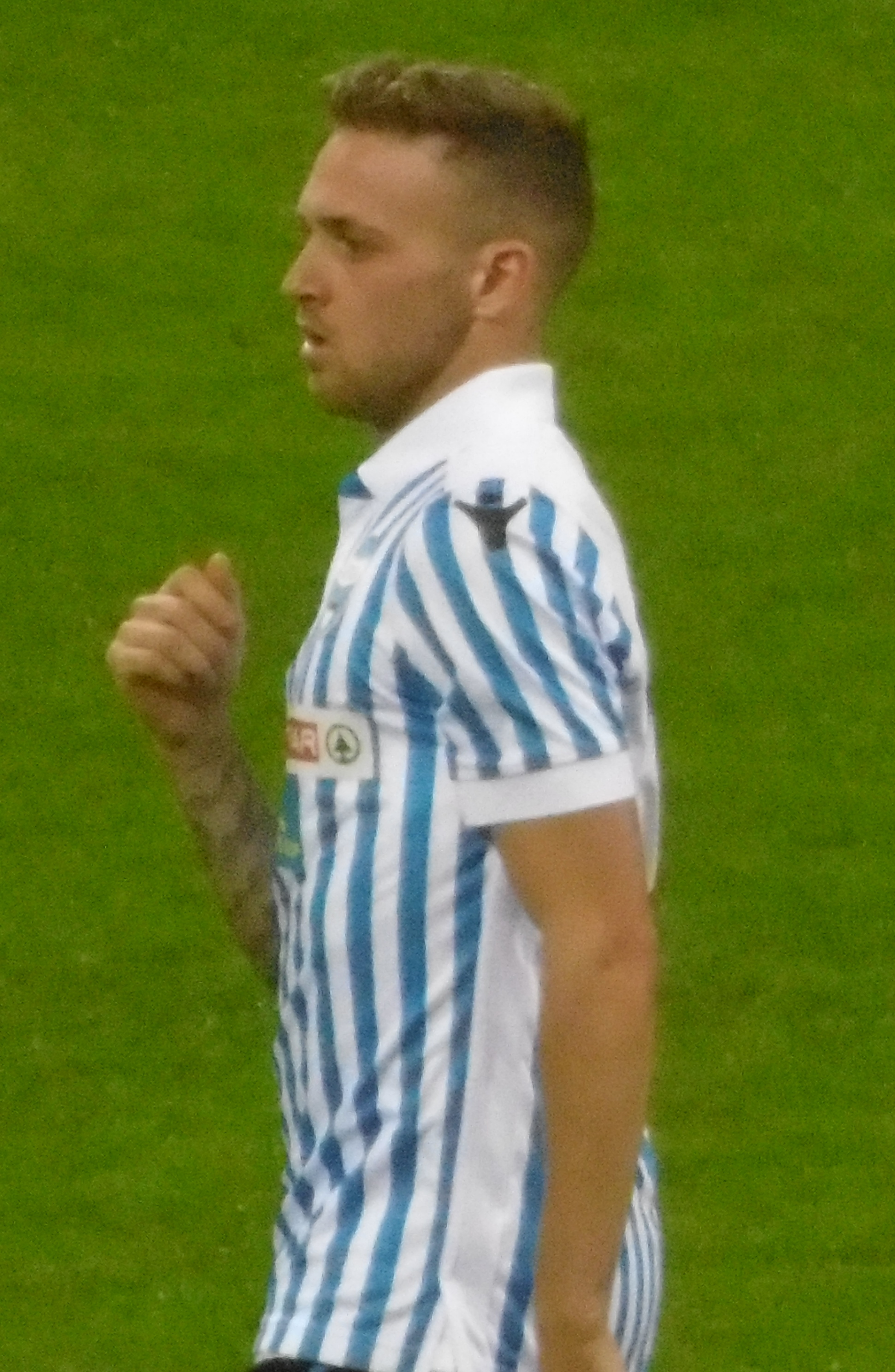 Manuel Lazzari nella partita Milan - Spal del 20 settembre 2017, Stadio Meazza (Milano)